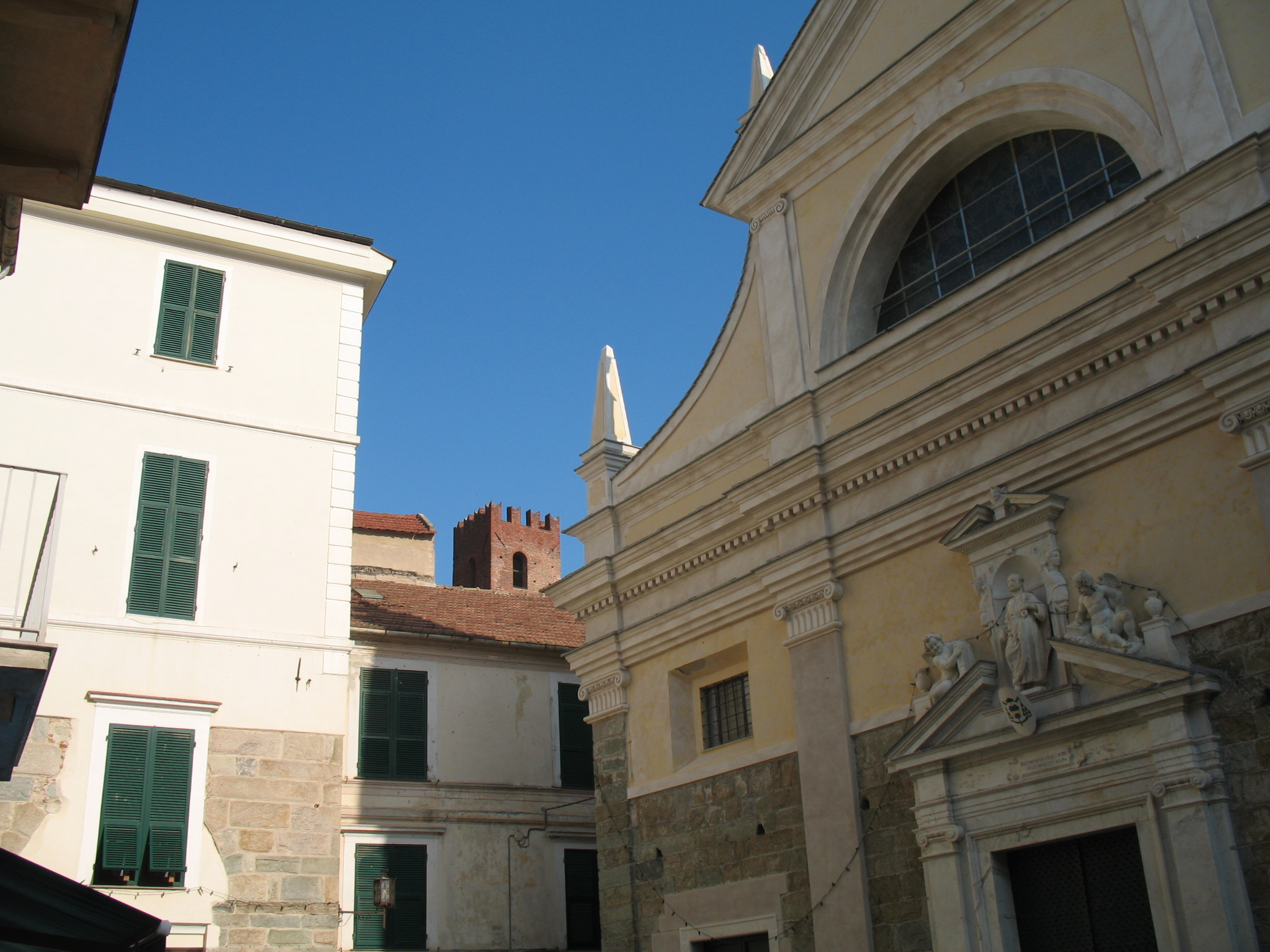 Serie di Immagini da Noli in provincia di Savona - cattedrale di San Pietro